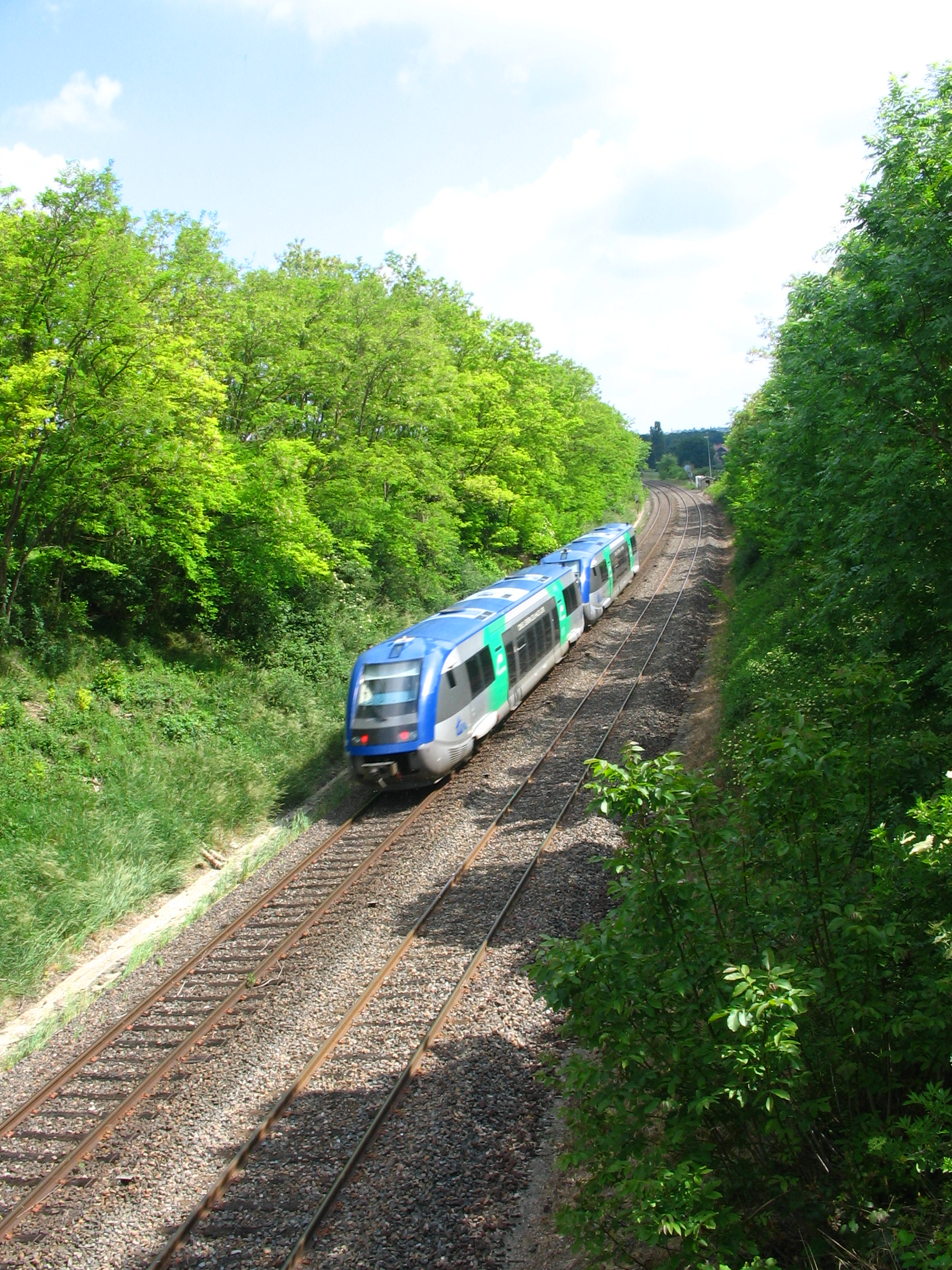 Cliché plutôt insolite, que ce passage de TER Auvergne sur la ligne de Saint-Germain des Fossés à Gannat (03). Ouverte en 1855 puis doublée en 1931 par la desserte de Vichy, ce dernier tronçon fût électrifié bien plus tard, captant dès lors la quasi-totalité du trafic. L'itinéraire historique est surtout utilisé en cas de neutralisation de l'axe principal (travaux, incident en ligne...), en dépit de caractéristiques intéressantes, qui permettraient un débit bien plus important: double voie, cantonnement par block automatique (BAL/BAPR selon sections), tracé plus rectiligne autorisant aussi les 160 km/h...